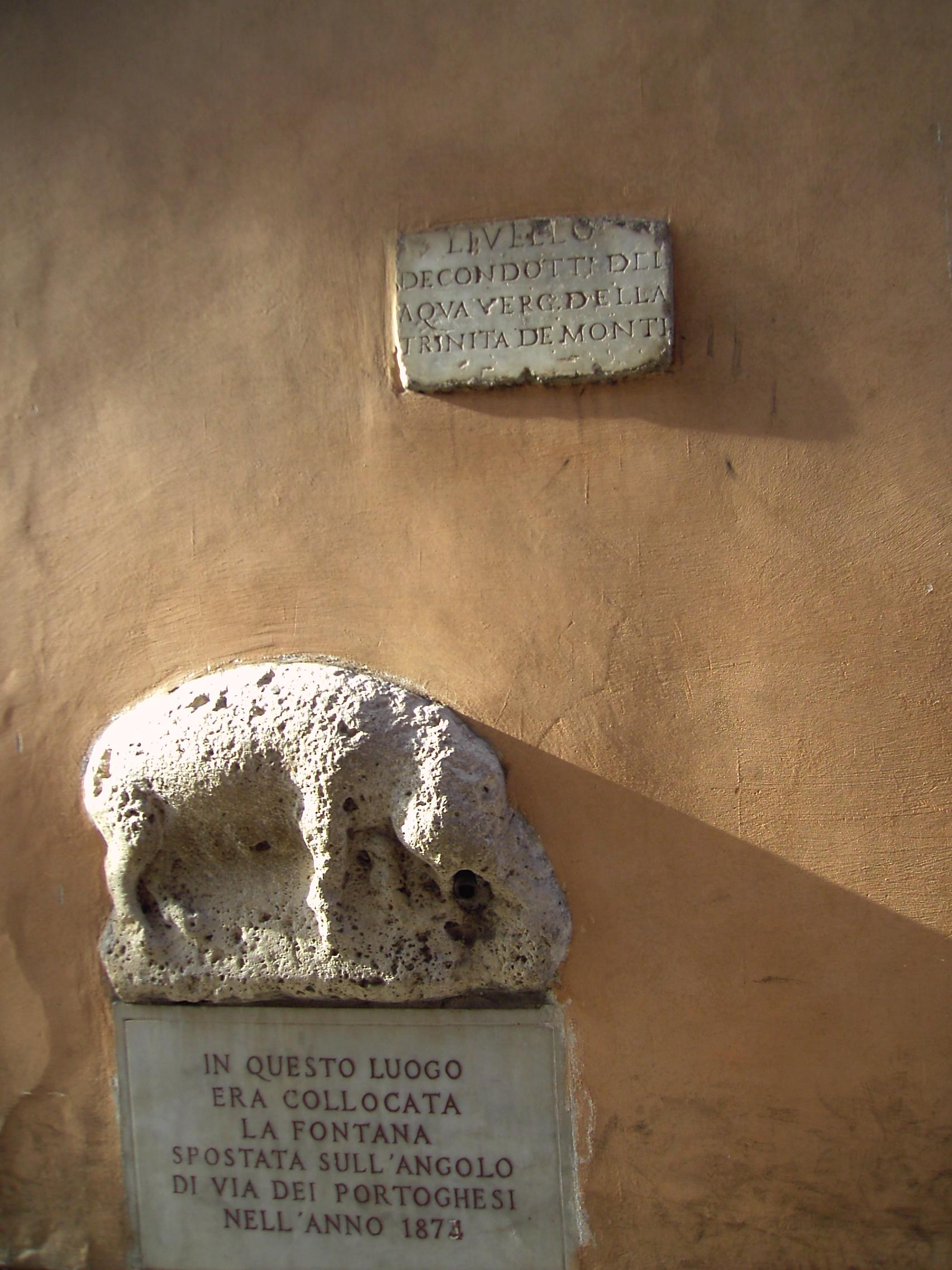 Roma, via della Scrofa: la scrofa della fontanella vedi